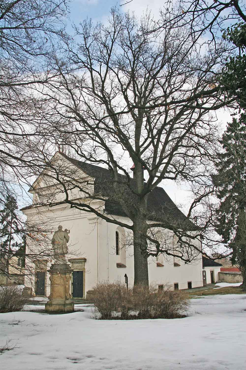 památný dub letní u kostela Panny Marie v Opočně